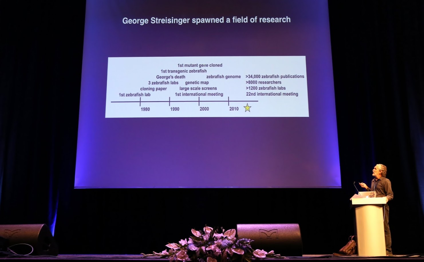 Monte Westerfield-George Streisinger 10th European ZebraFish Meeting, Budapest, Hungary 3-7 July 2017.